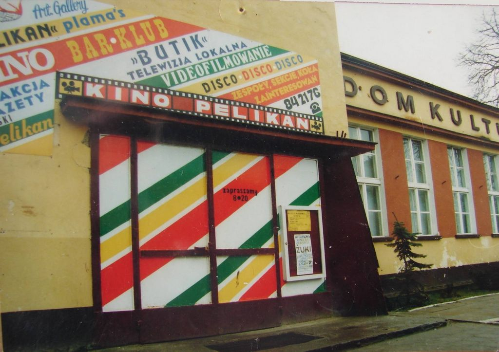 Szubiński Dom Kultury w latach 90-tych